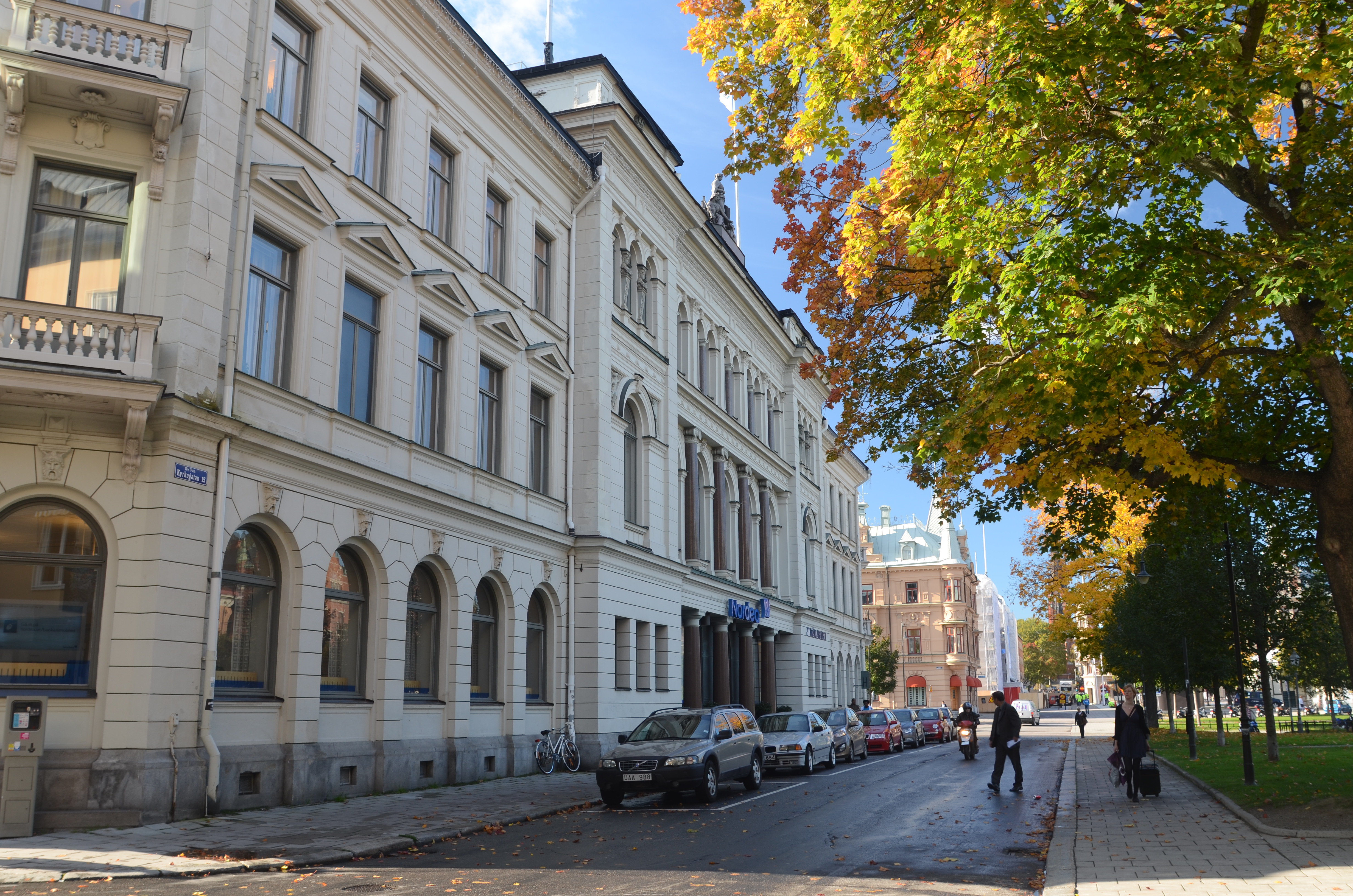 Sundsvallsbankens hus, Pan 5, Sundsvall Kyrkogatan